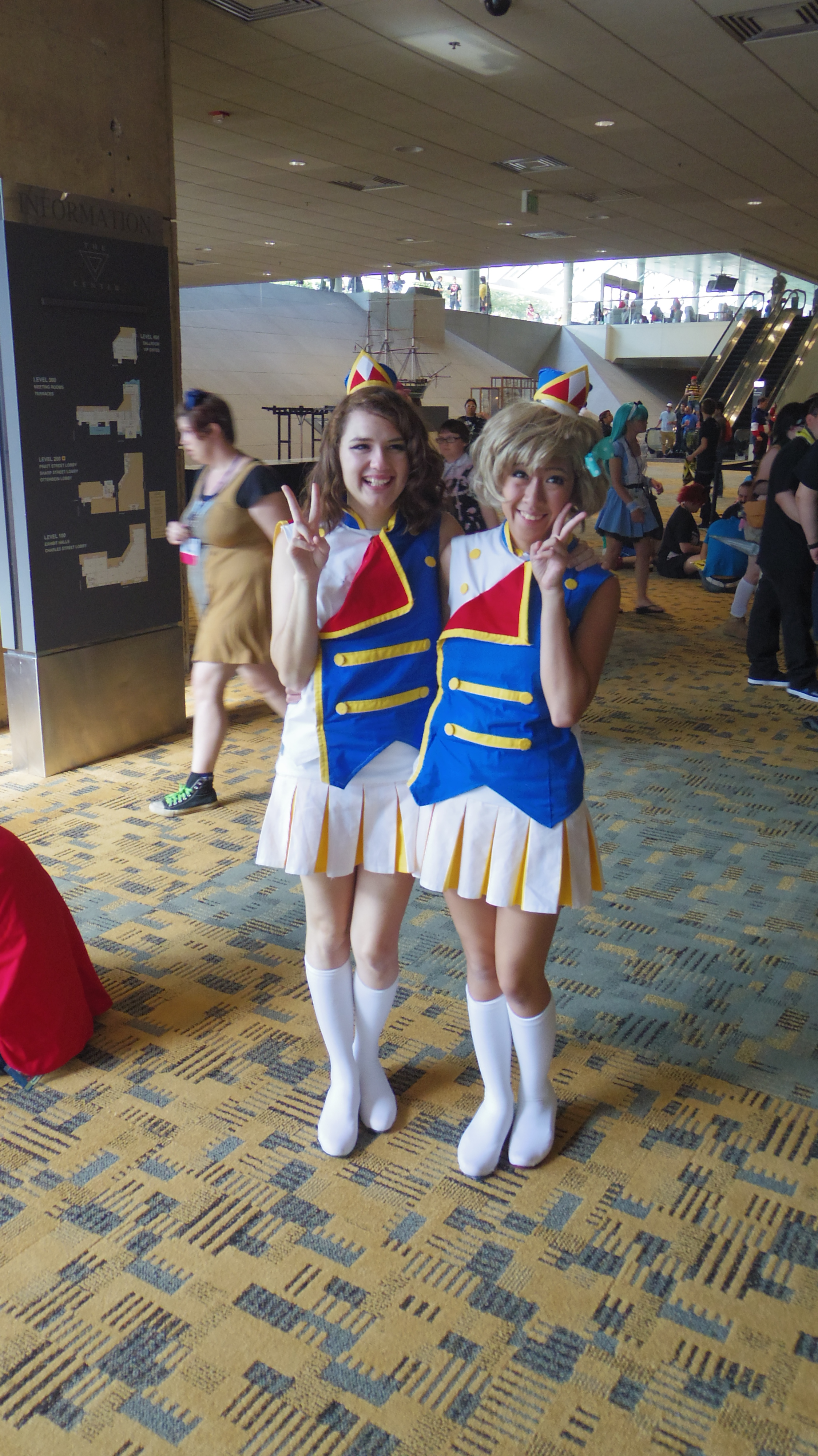 Kumiko and Sapphire #2